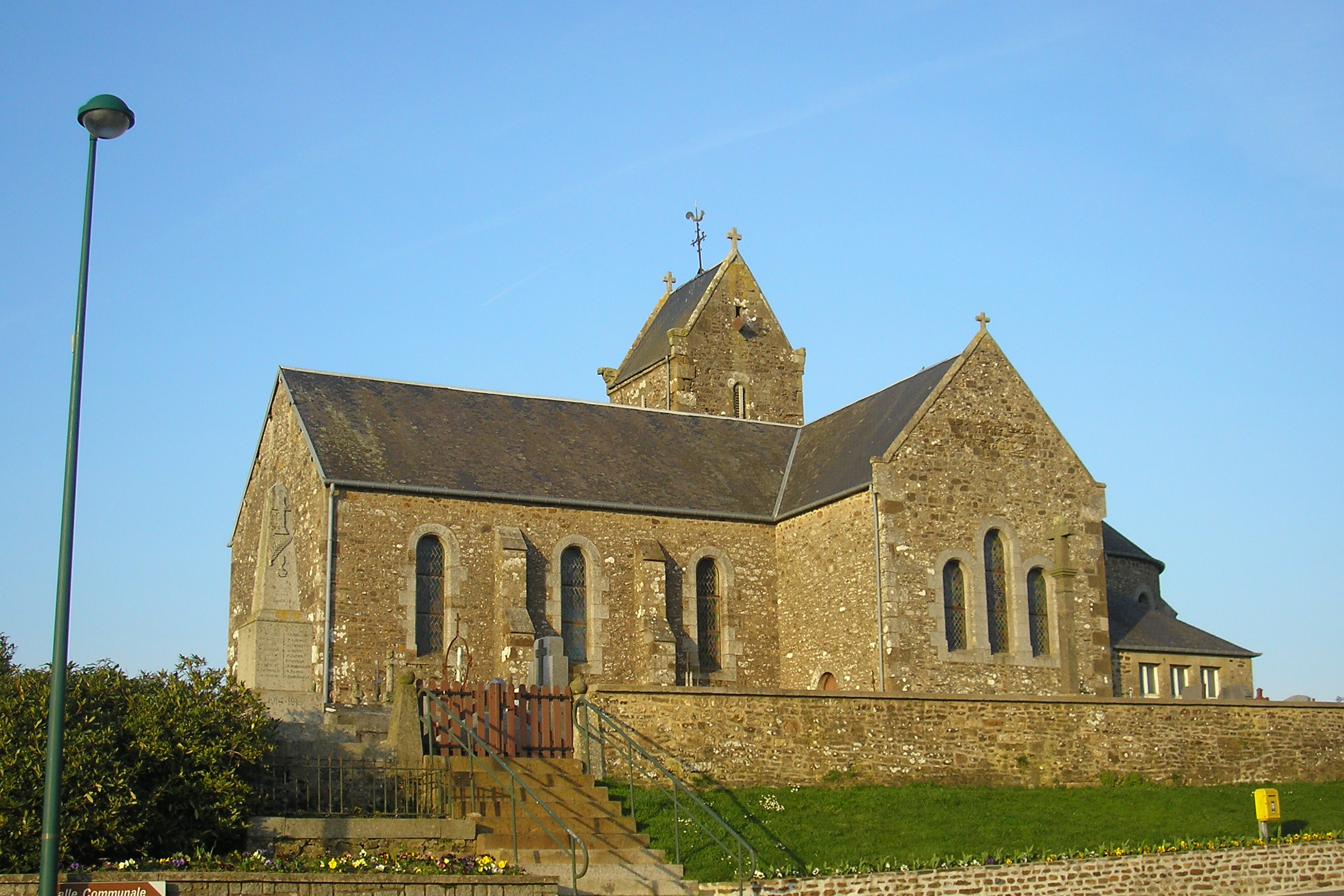 Montjoie-Saint-Martin (Normandie, France). L'église.